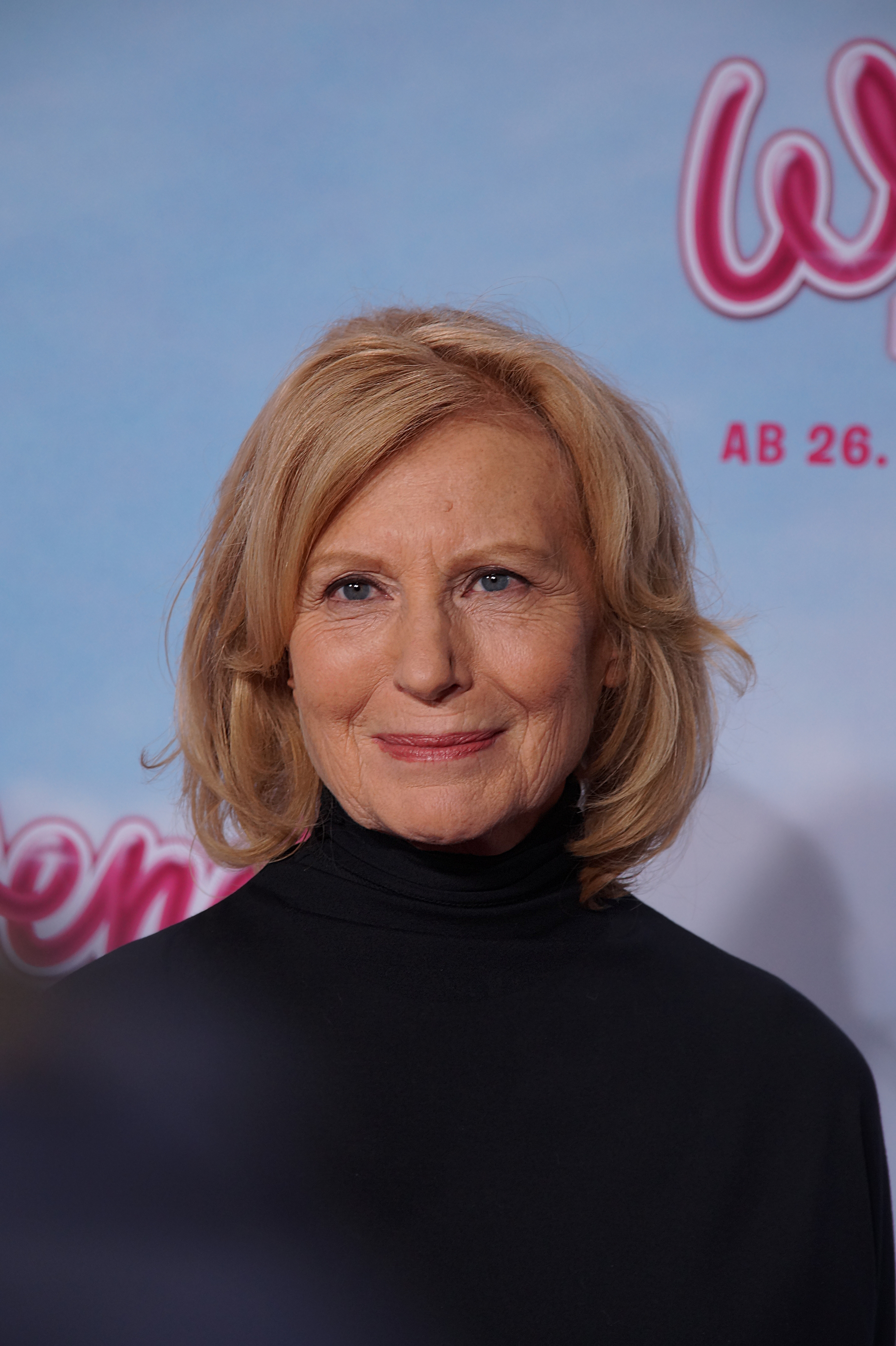 Maren Kroymann bei der 'Wendy - Der Film' Premiere, im Januar 2017.